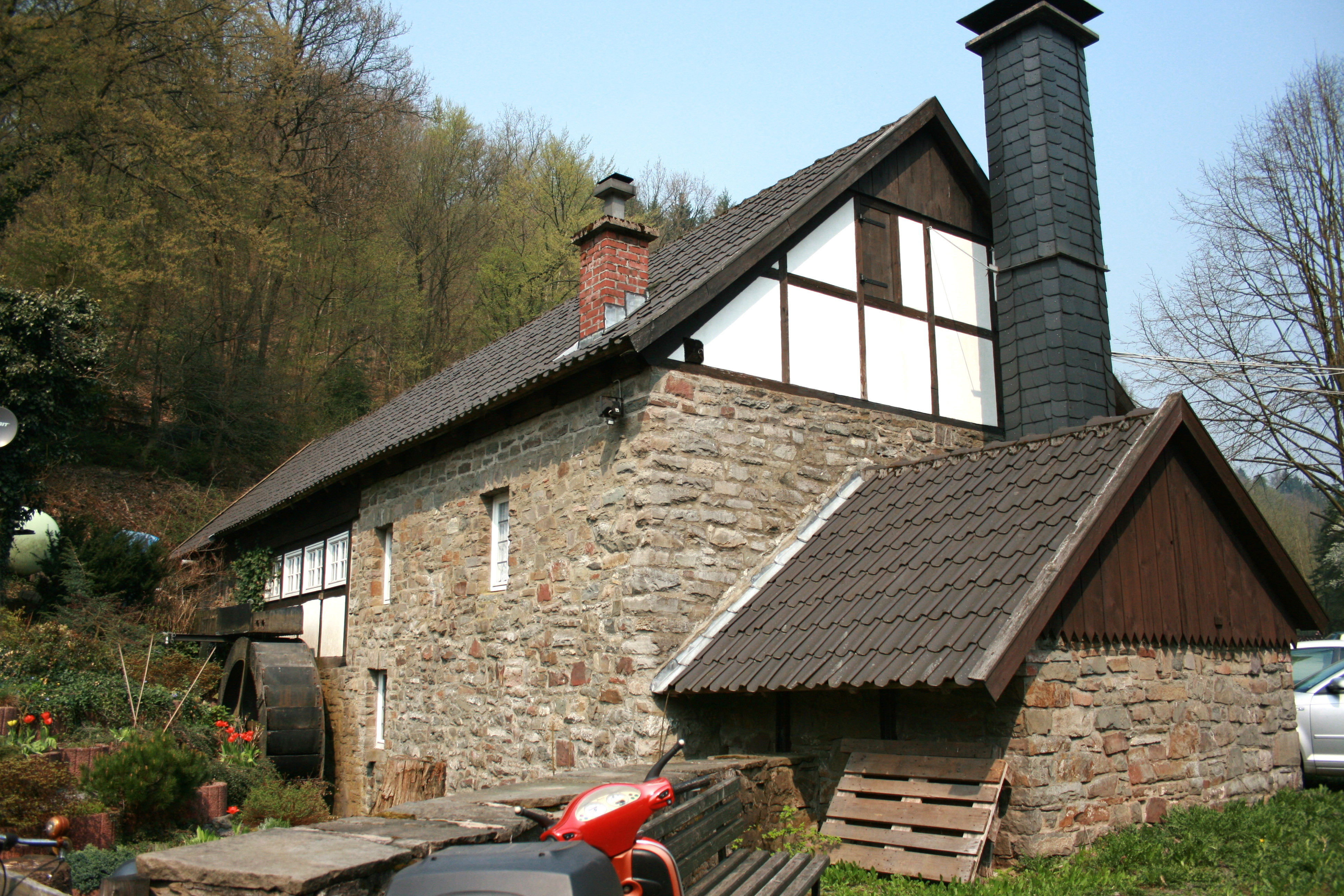 Brenscheider Kornmühle in Brenscheid, Nachrodt-Wiblingwerde